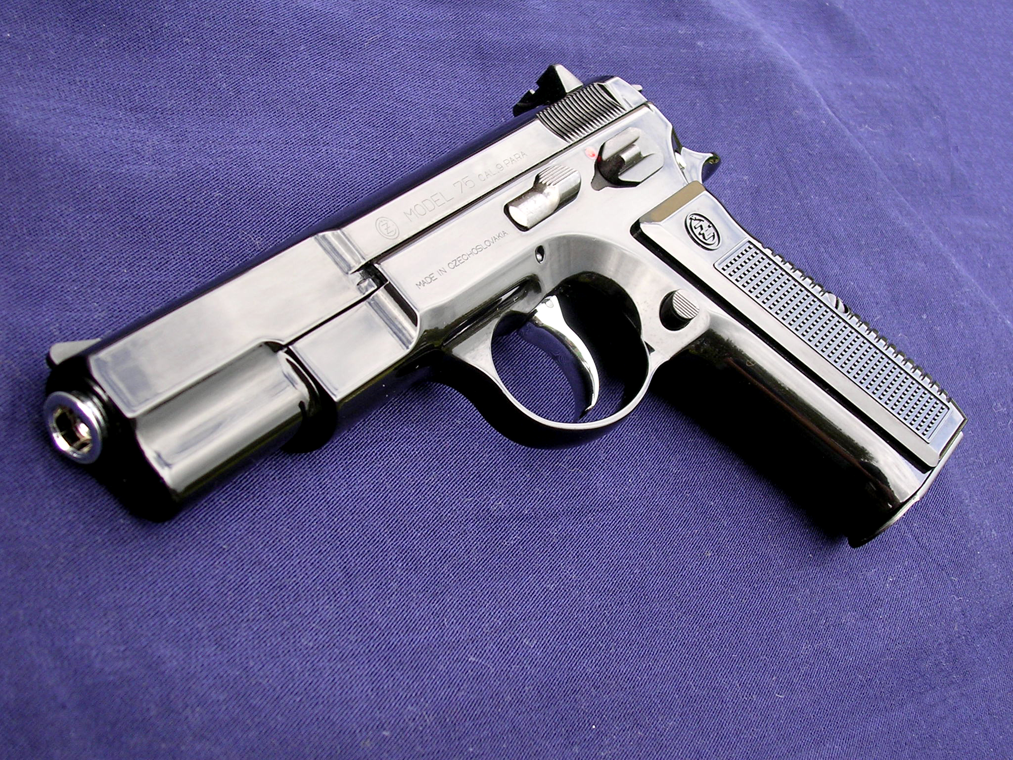 Takto vypadá původní model CZ-75.